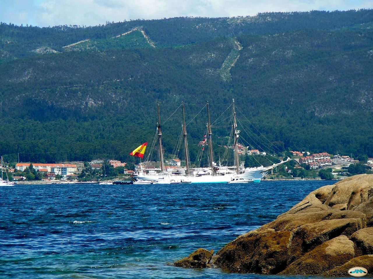 Ría de Pontevedra y Marín-Entrada del J.S.Elcano17